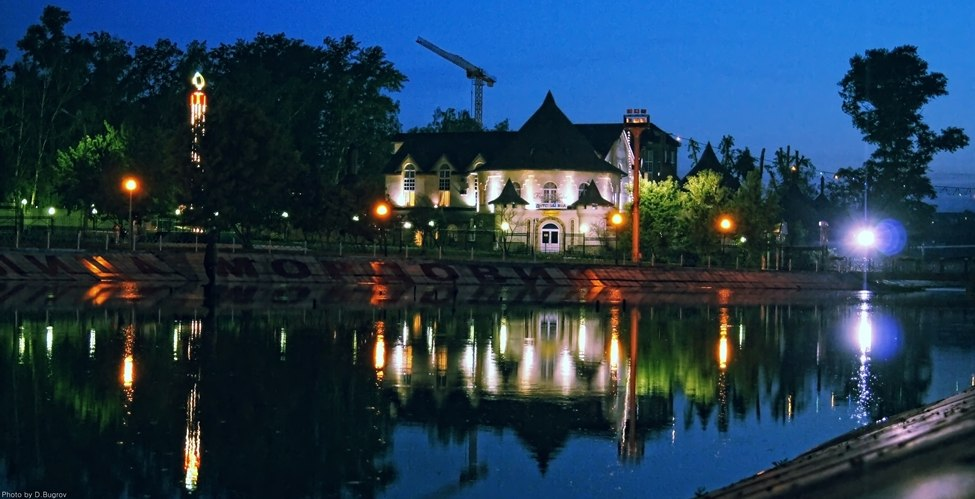 Ресторанно-гостиничный комплекс "Park Hotel"